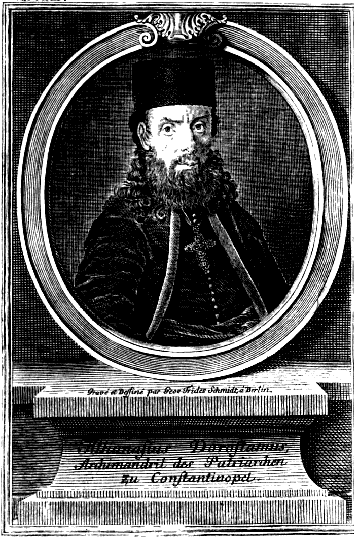 Documentu conţine portretul arhimandritului Proilaviei, Atanasie Dorostamos de la 1737